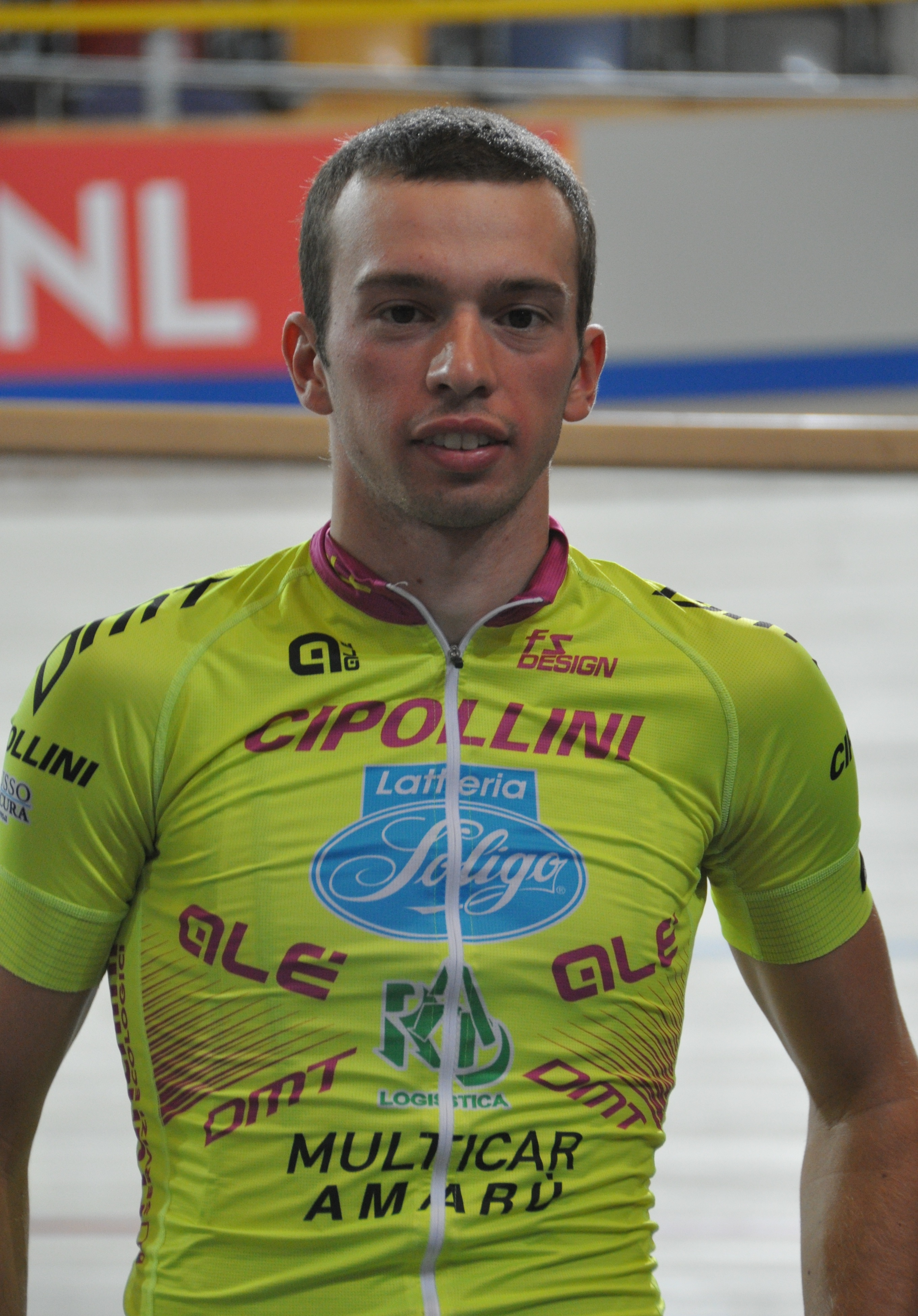 Francesco Castegnaro, italienischer Radsportler